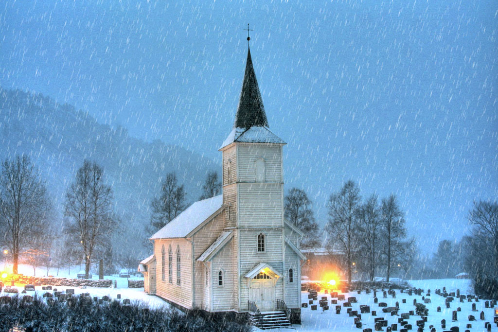 no: Hyllestad kyrkje en: Hyllestad church